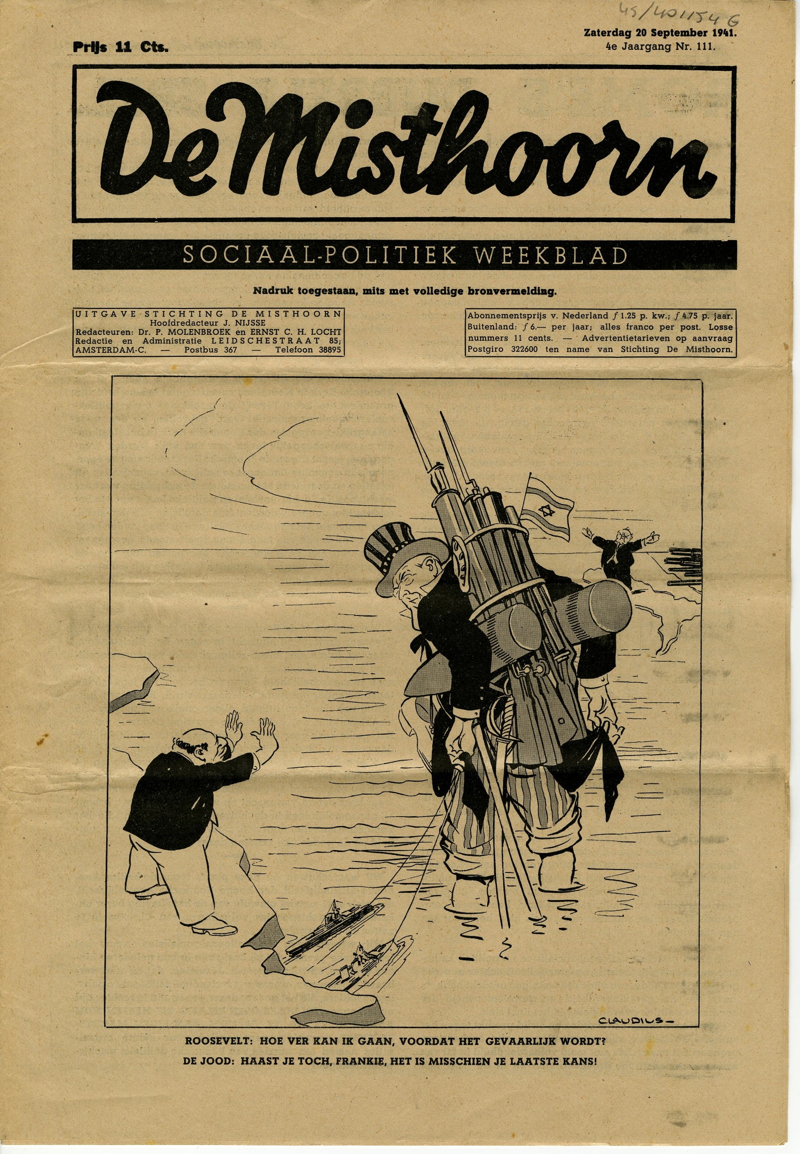 De Misthoorn was een antisemitisch blad dat werd uitgegeven tussen februari 1937 en september 1942. Het verscheen twee keer per maand, later wekelijks. Voorpagina uit nummer 11 (20 september 1941).